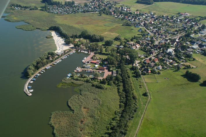 Das kleine Fischerdörfchen Mönkebude aus der Vogelperspektive